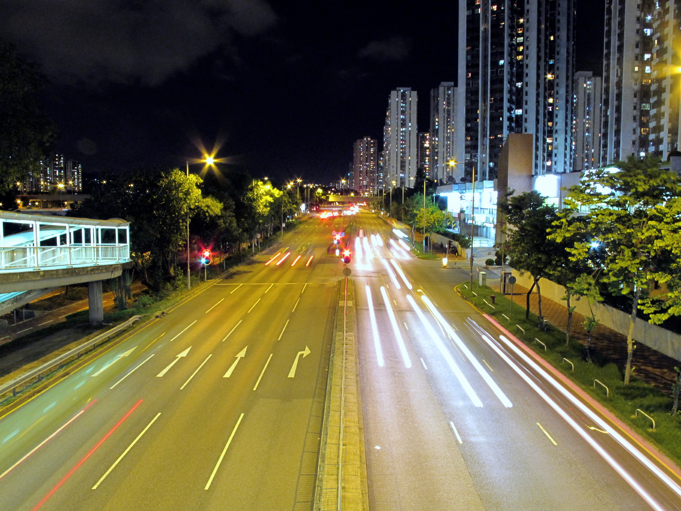 Tai Chung Kiu Road Night View